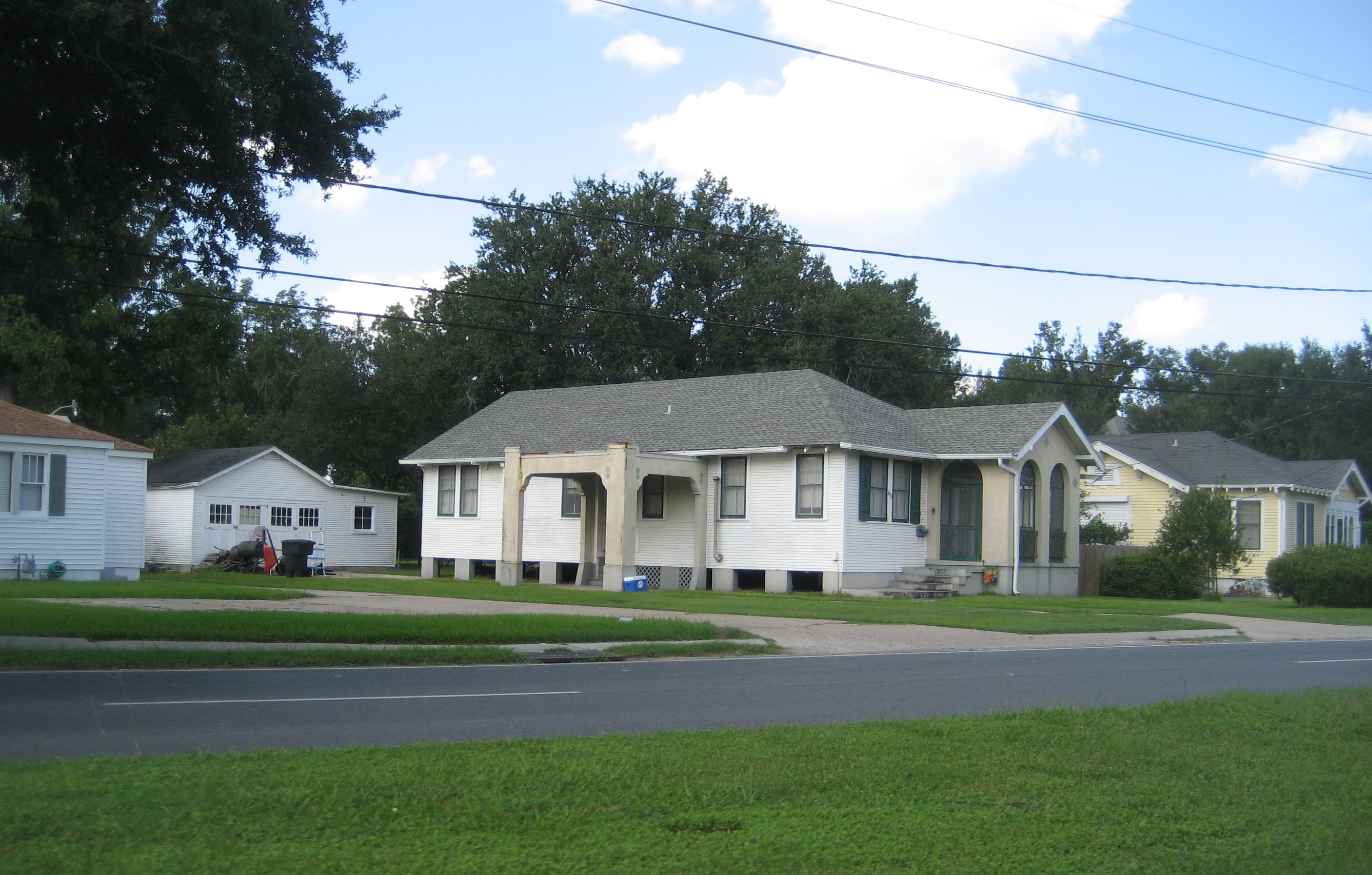 House, Belle Chasse, Louisiana.